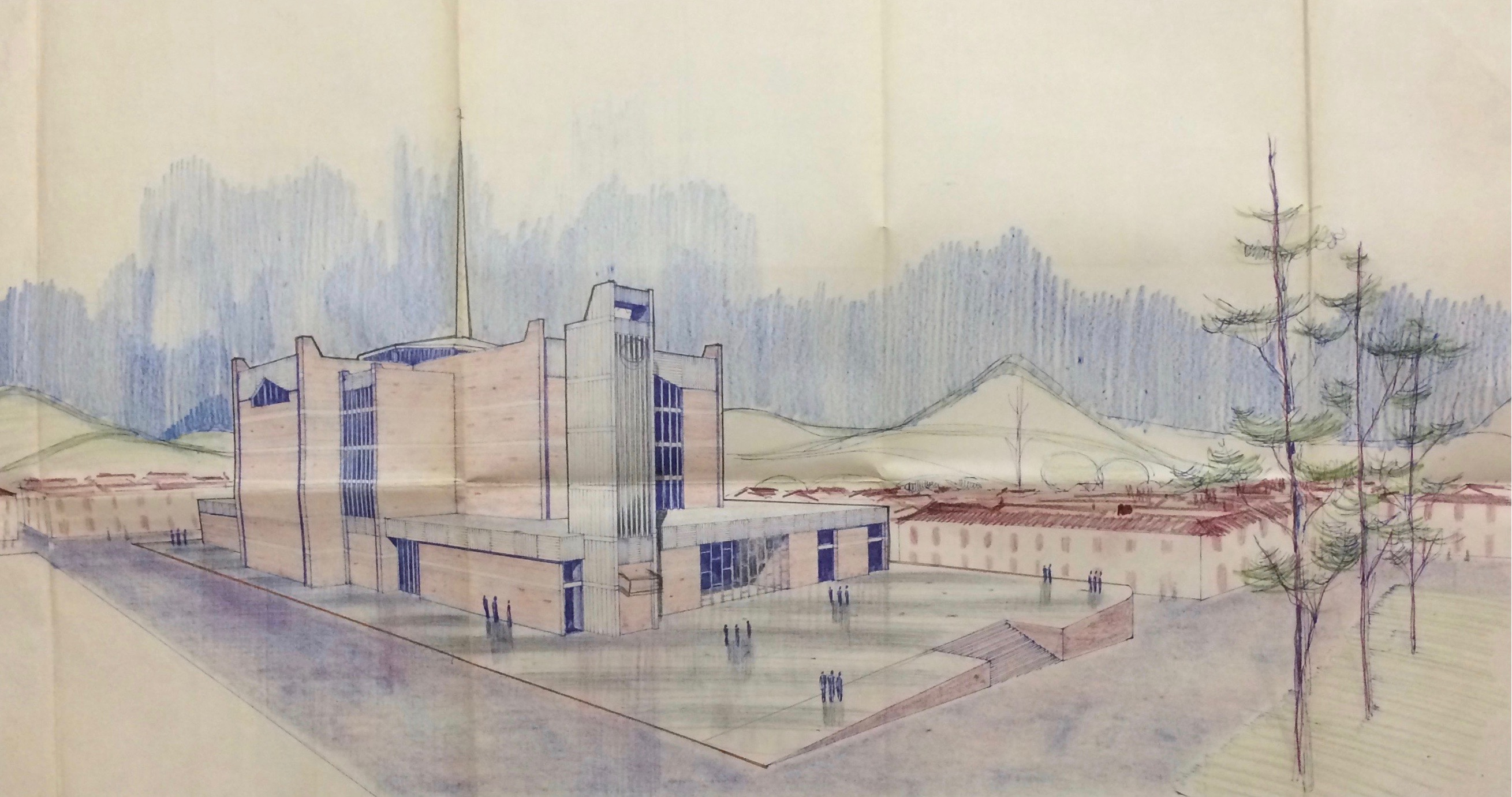 Perspectiva presentada como parte del concurso de diseño de la Catedral de Sonsón en 1964 (Proyecto ganador).